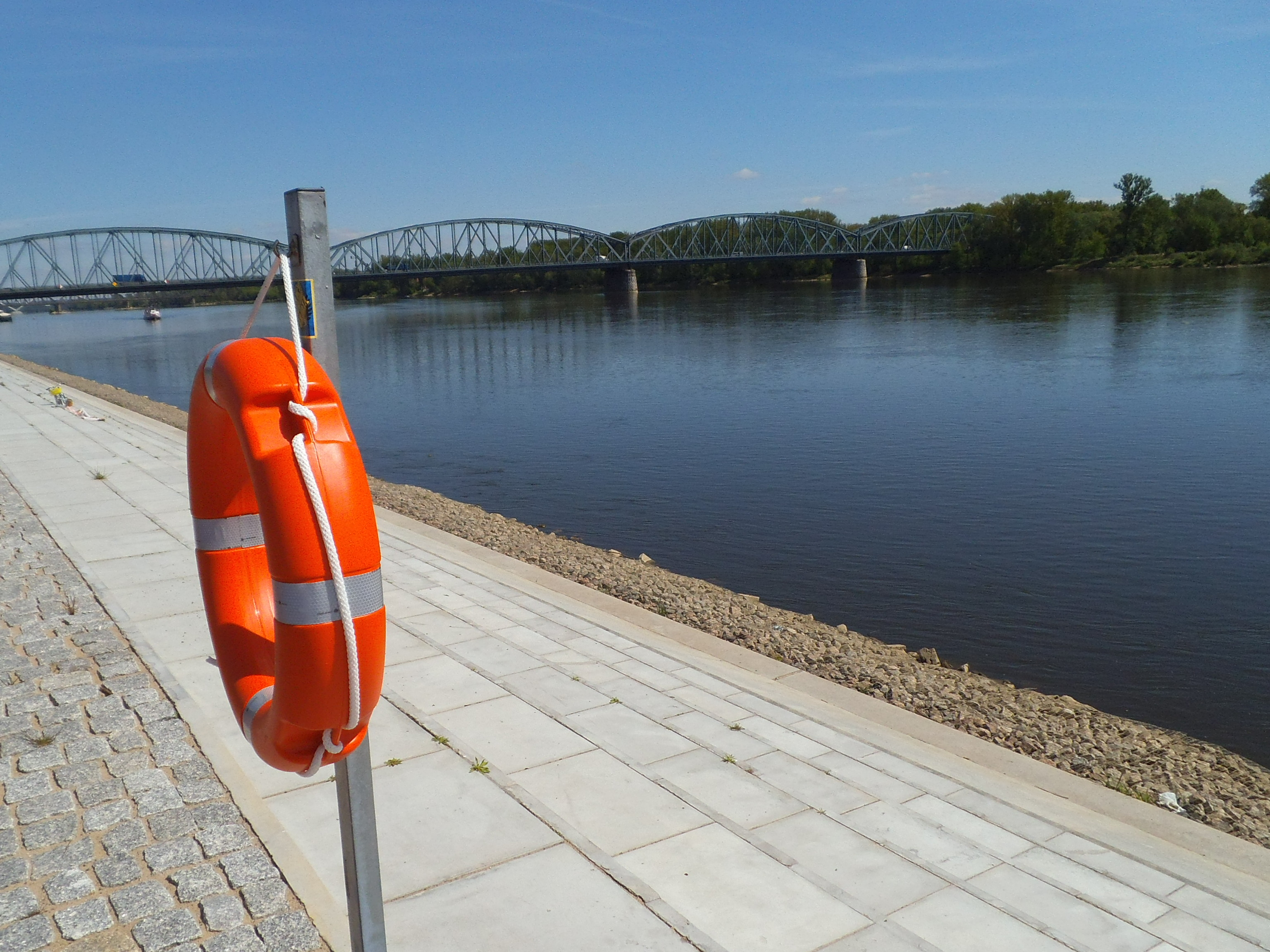 Wisła w Toruniu